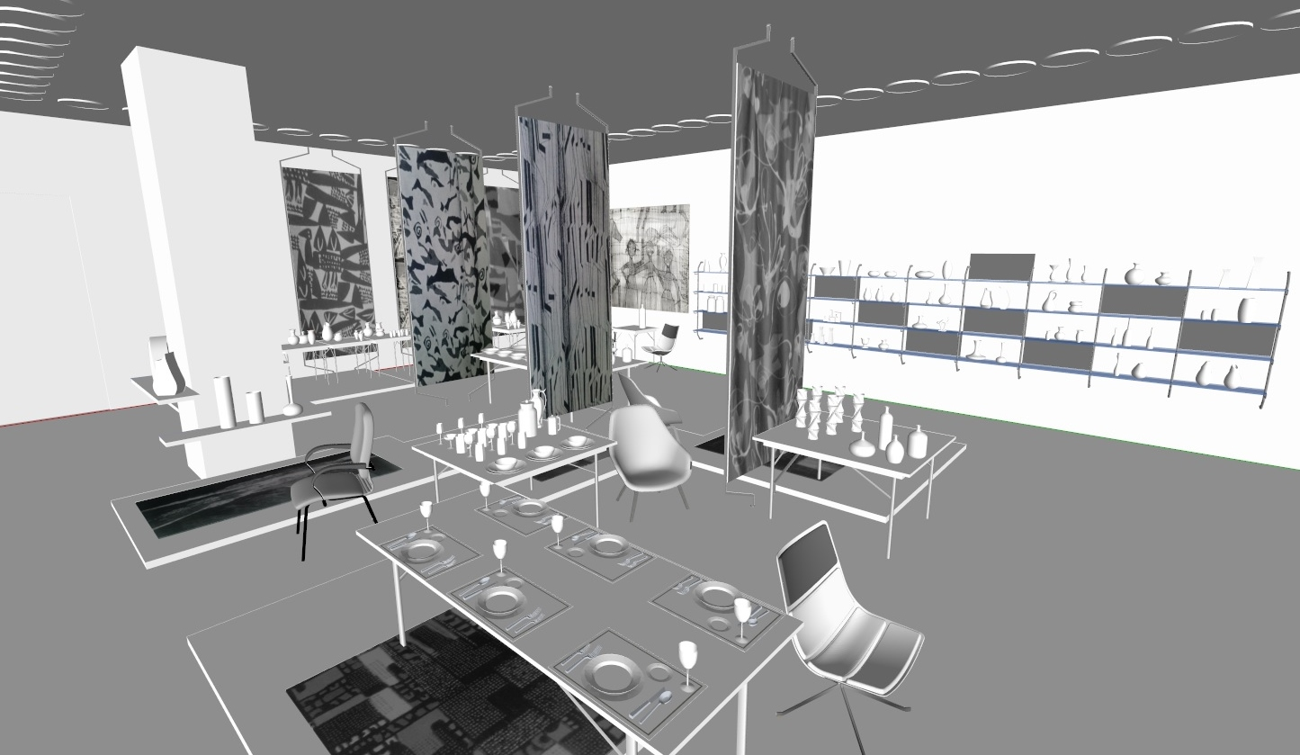 Padiglione della CecoslovacciaTemplate:ScreenshotCopyrighted